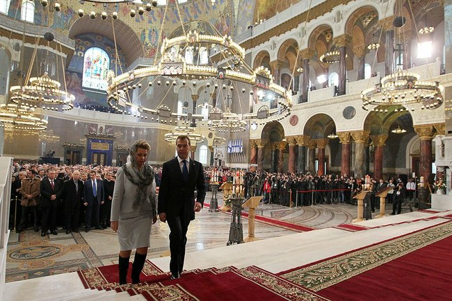 Дмитрий и Светлана Медведевы на церемонии освящения Никольского морского собора.